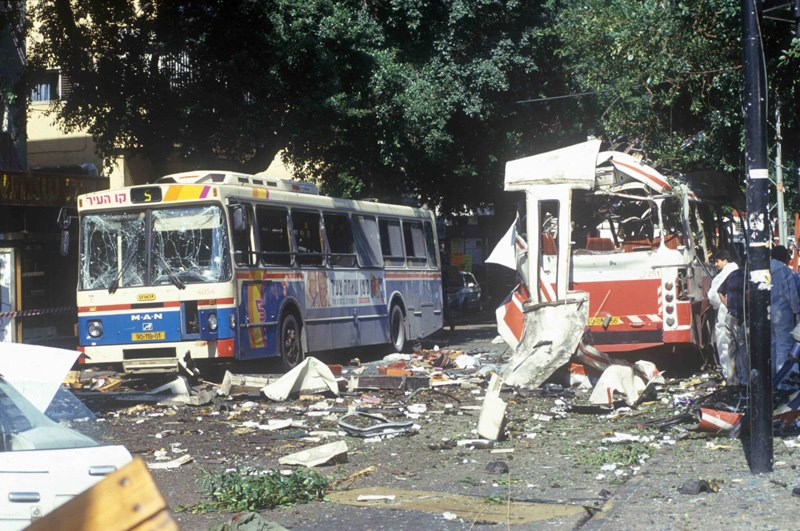 פיגוע באוטובוס קו 5 בתל-אביב